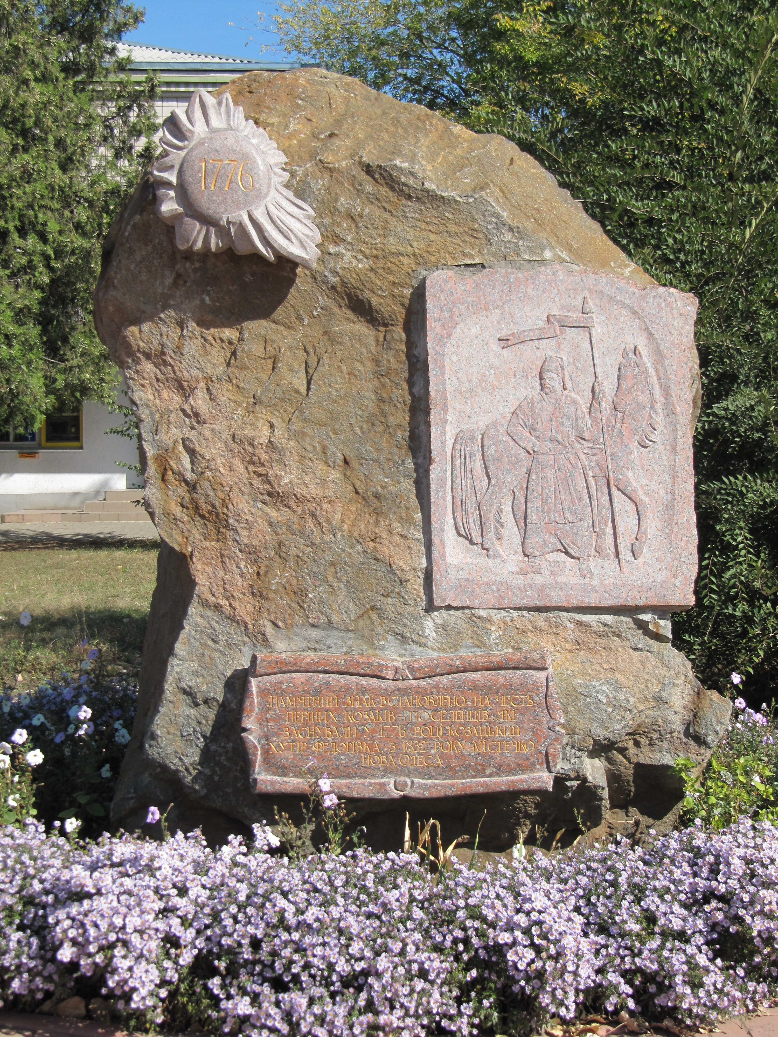 Нова Одеса, пам'ятний знак на честь перших поселенців Миколаївська весна у Вікіпедії